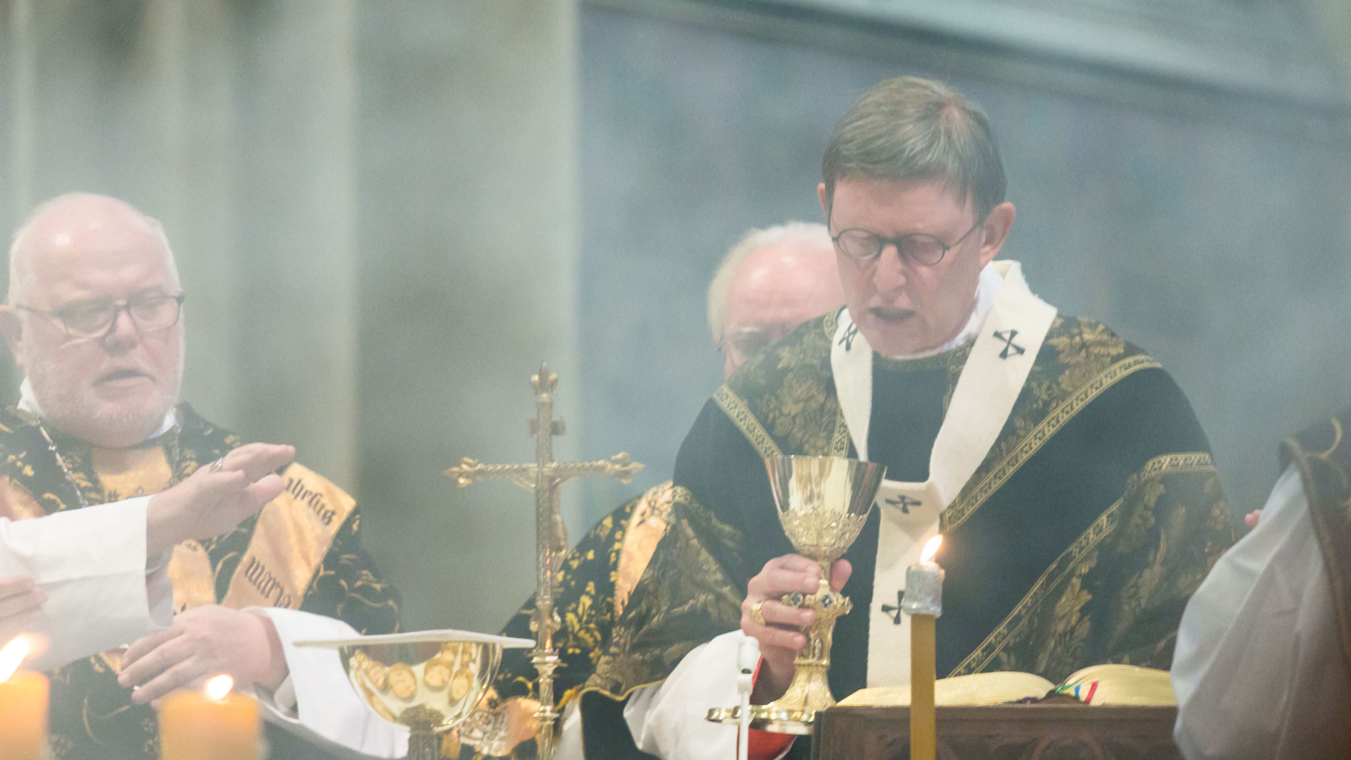 Exsequien Joachim Kardinal em. Meisner